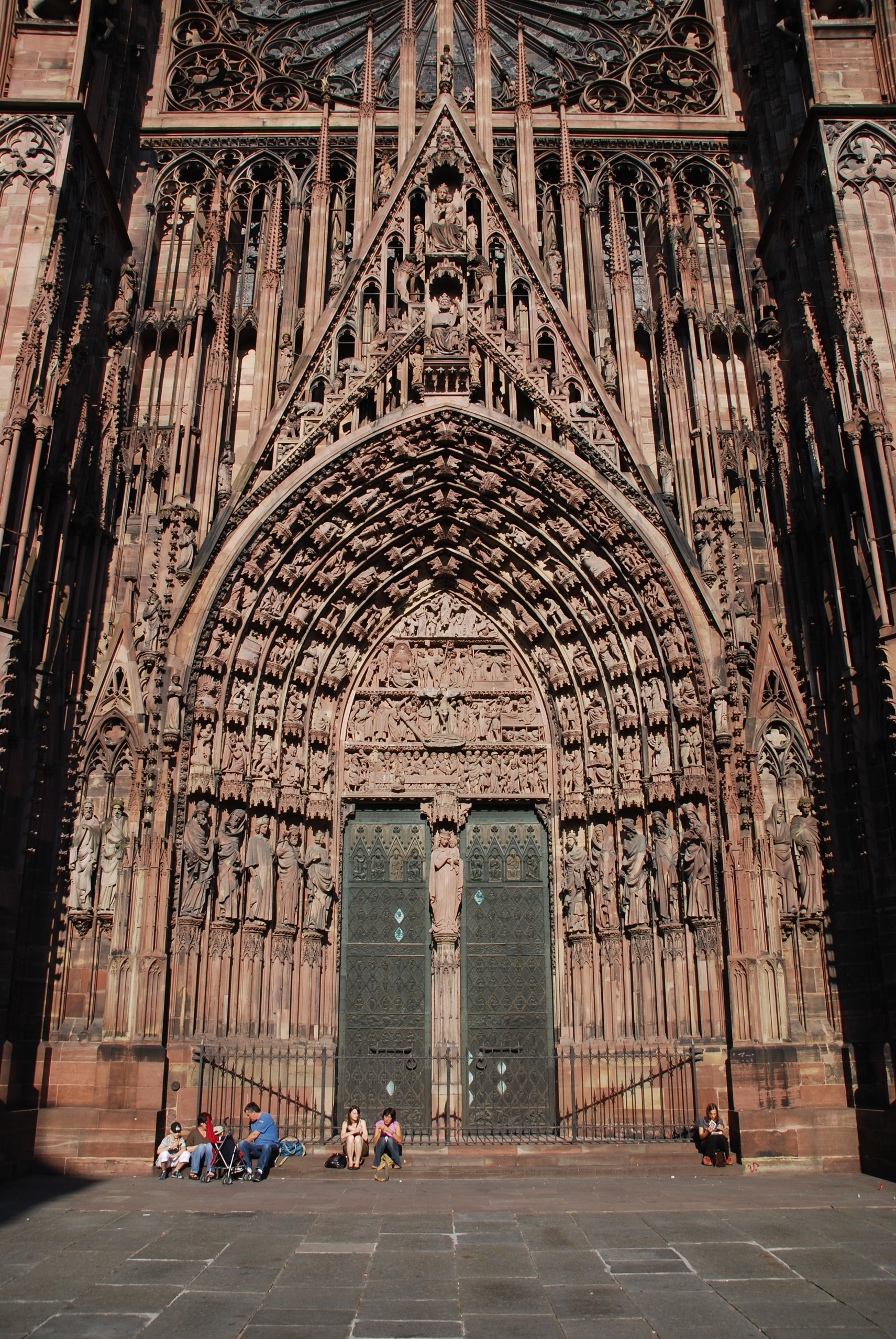 Hauptportal des Straßburger Münsters